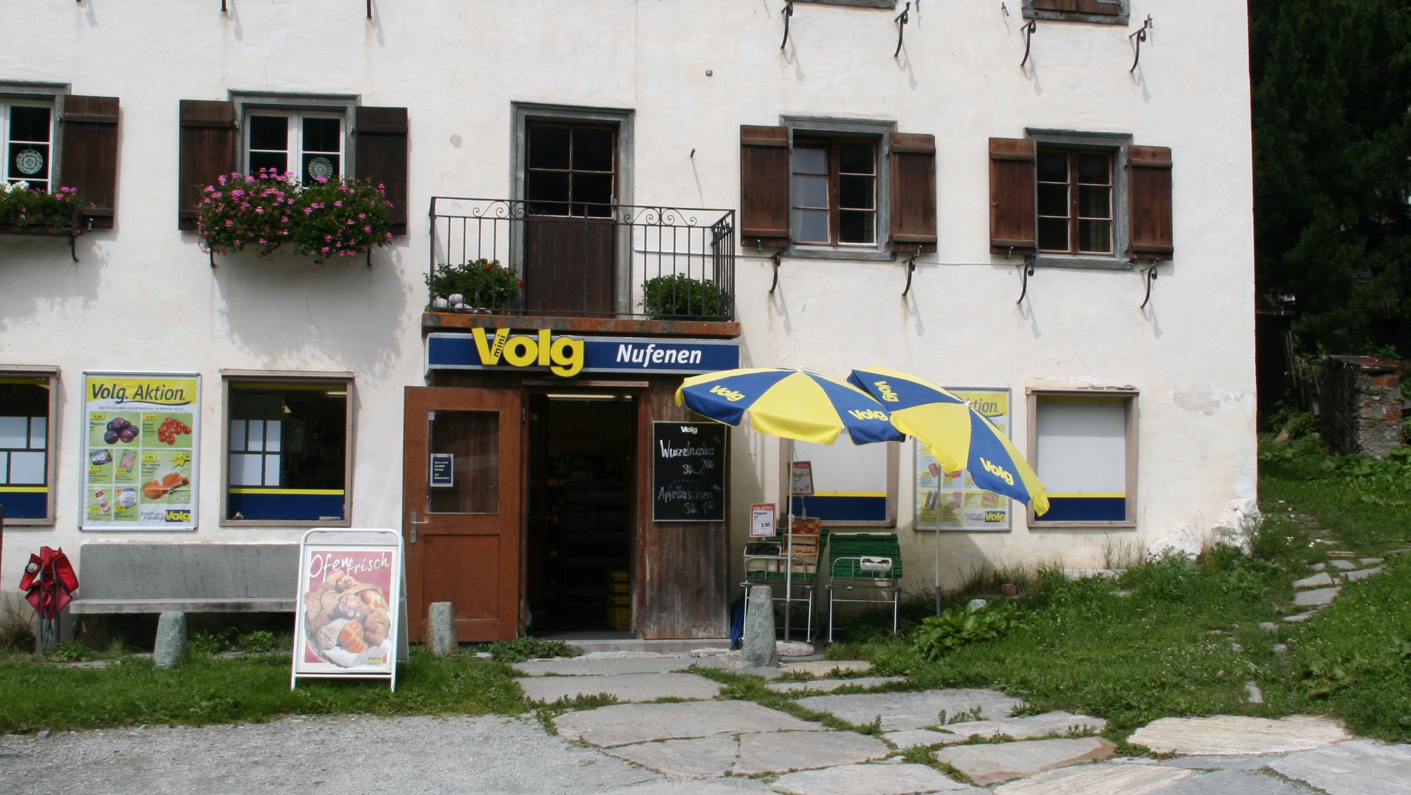 Volgl in Nufenen